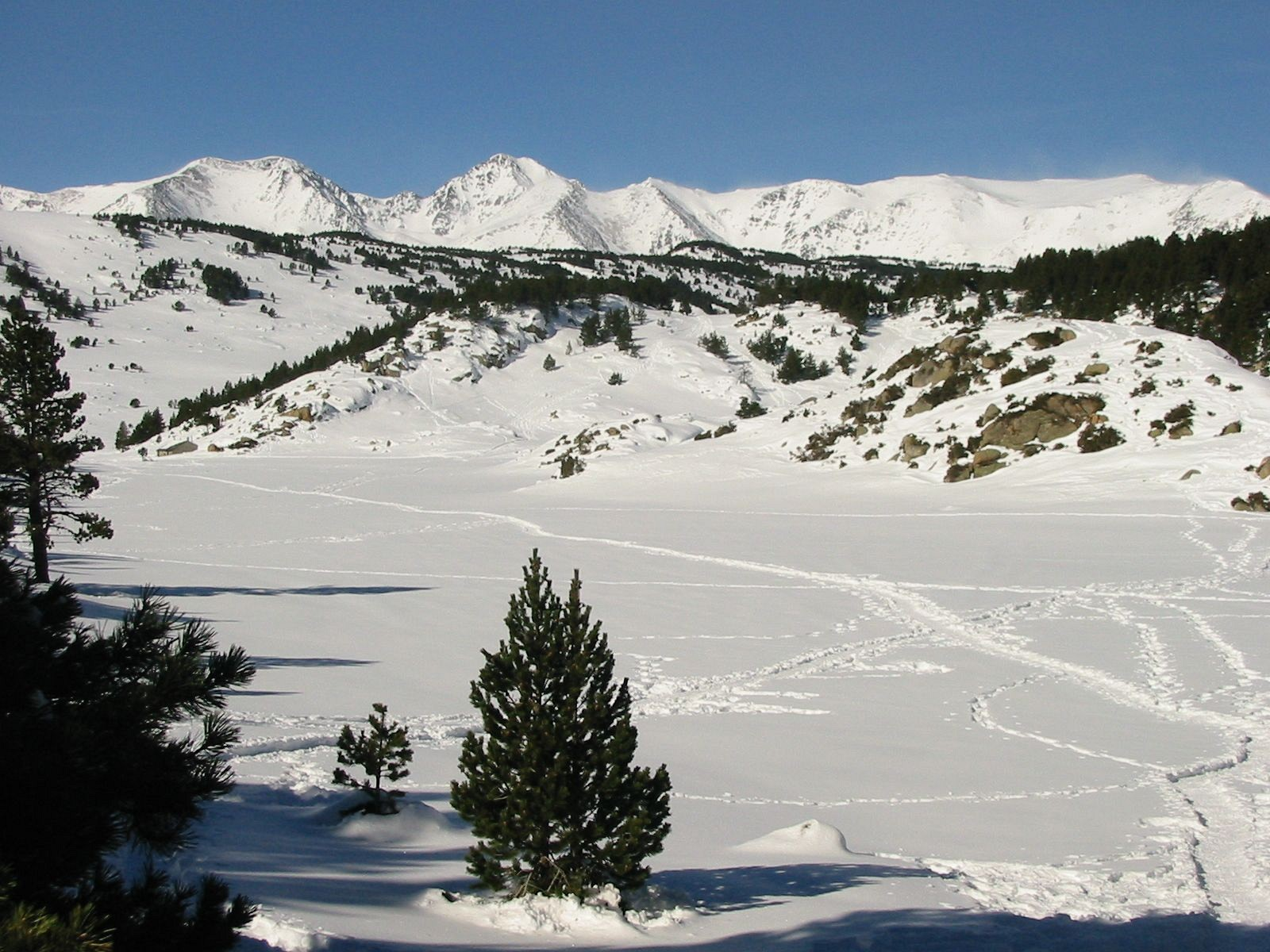 Lac de Pradeille et pic Carlit au centre, Bolquère, Pyrénées-Orientales, France